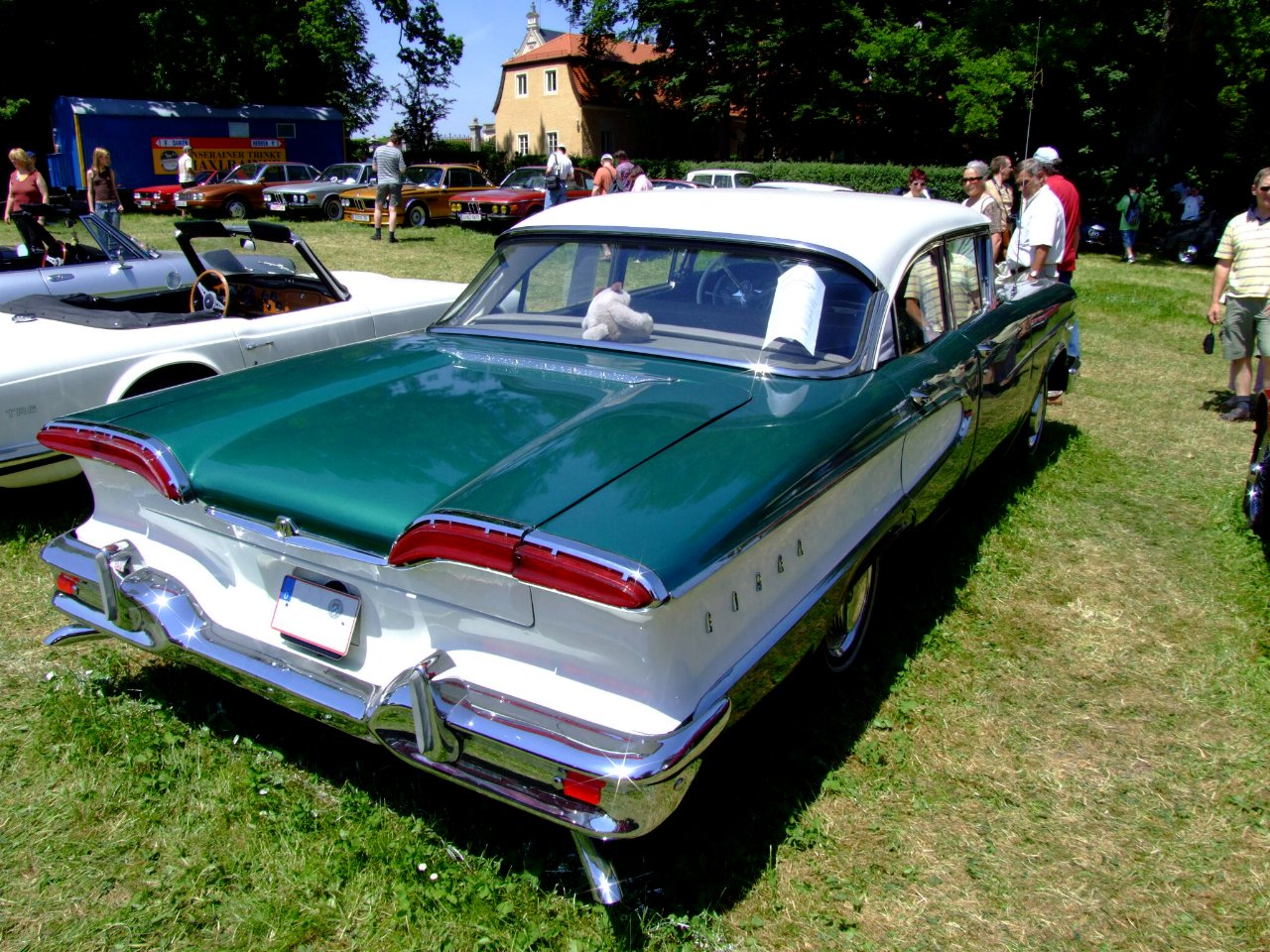 Edsel Ranger Sedan 1958 back